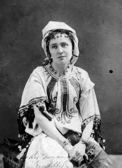 Jászai Mari (1850–1926) színésznő portréja. Koller Károly fényképfelvétele